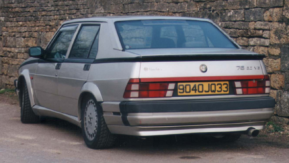 Alfa Romeo 75 V6 3.0 photgraphiée par le propriétaire dans le Berry. Auteur: D. Emonts Image:PD-icon.svg